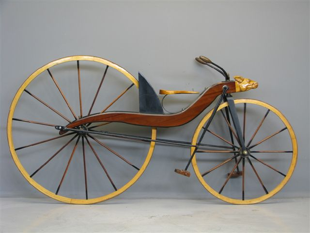 Replica of the probably never built MacMillan bicycle from 1842